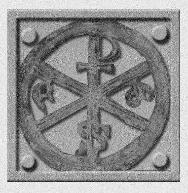 Reconstrucción - reproducción del crismon que se encuentra en la puerta de acceso a la iglesia desde el claustro del monasterio de Fitero Navarra España